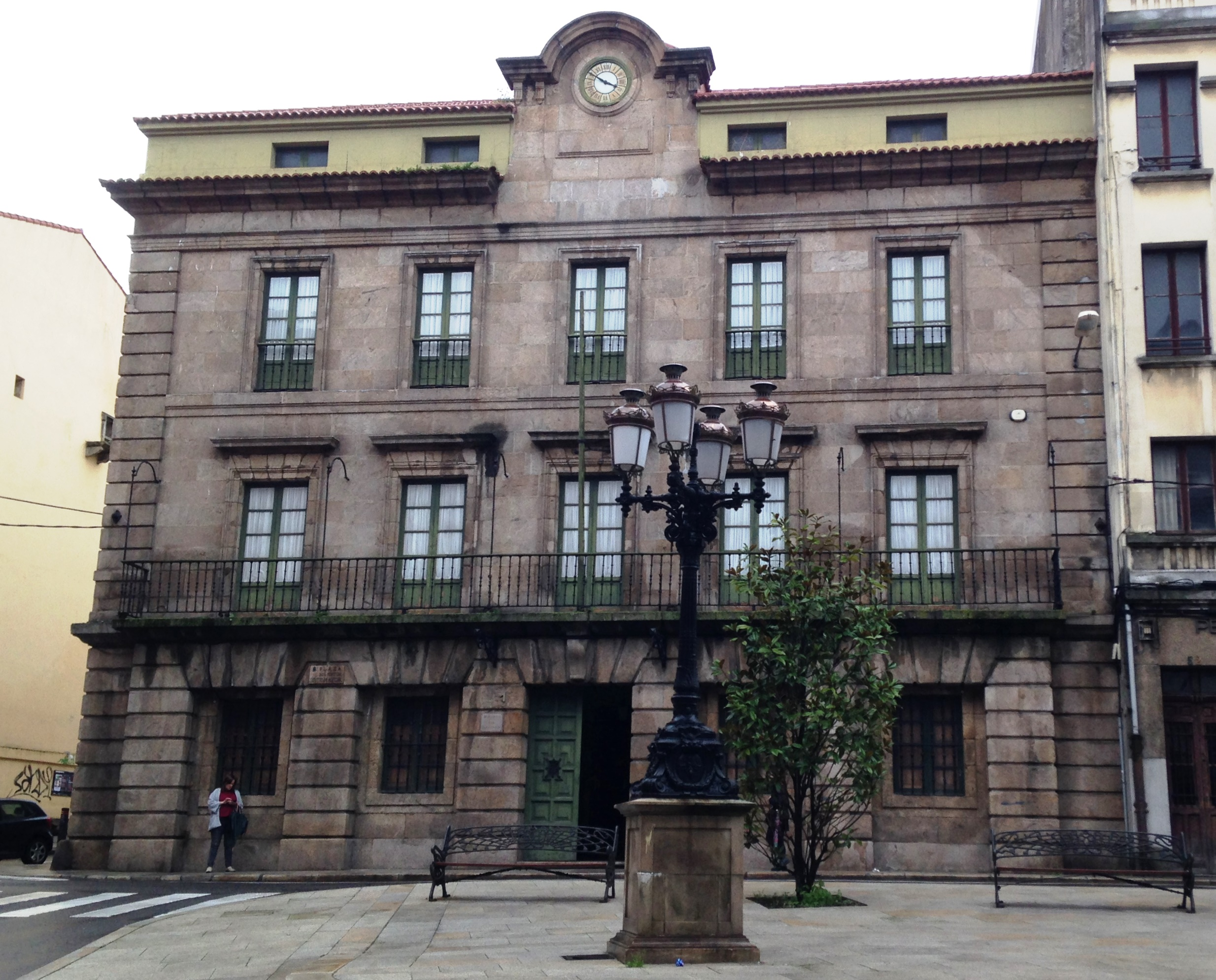 Fachada da Casa do Consulado na Rúa Panaderas (A Coruña)